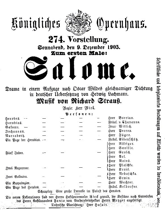 Afisz zapowiadający prapremierę opery Salome Ryszarda Straussa